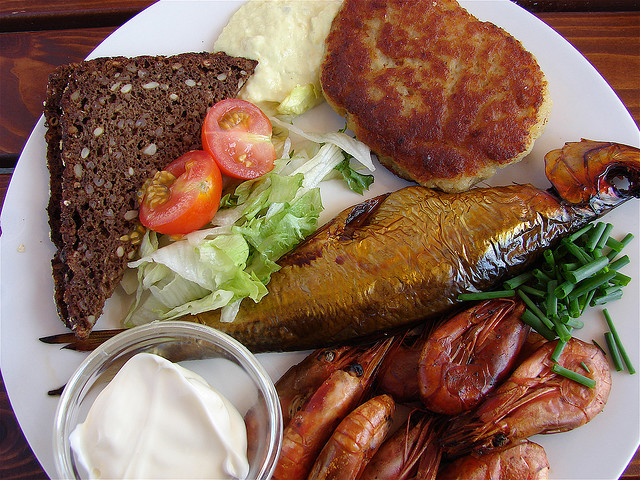 Frokost på Bornholm, 2009